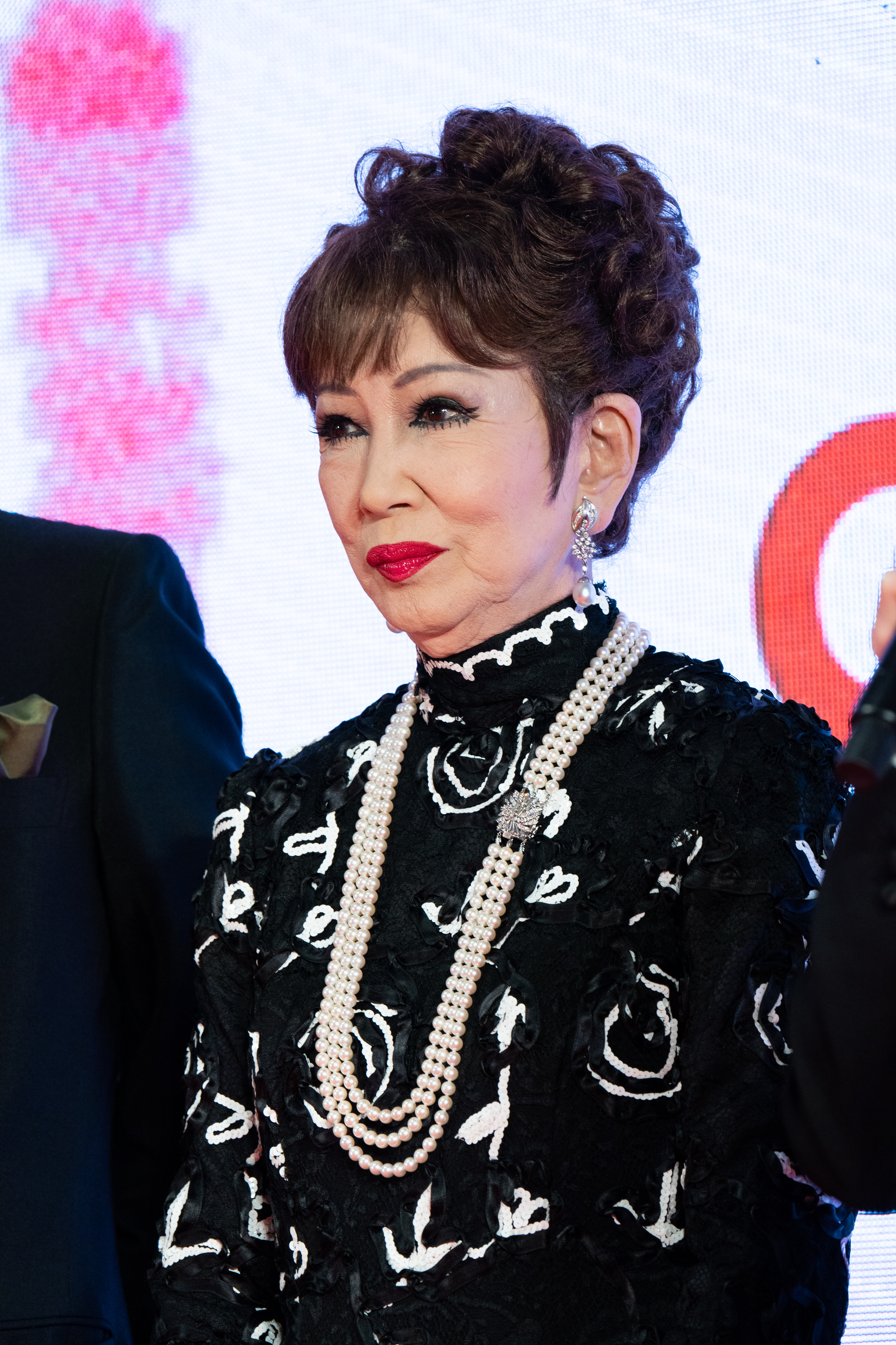 第32回 東京国際映画祭 オープニングセレモニー 浅丘ルリ子 (男はつらいよ お帰り 寅さん)